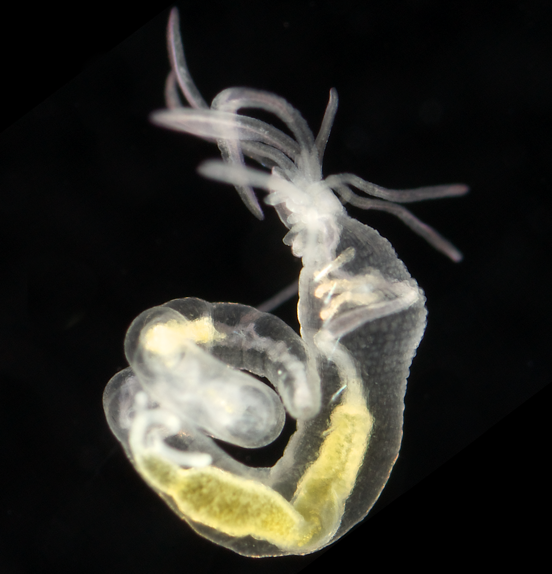 Lysilla loveni